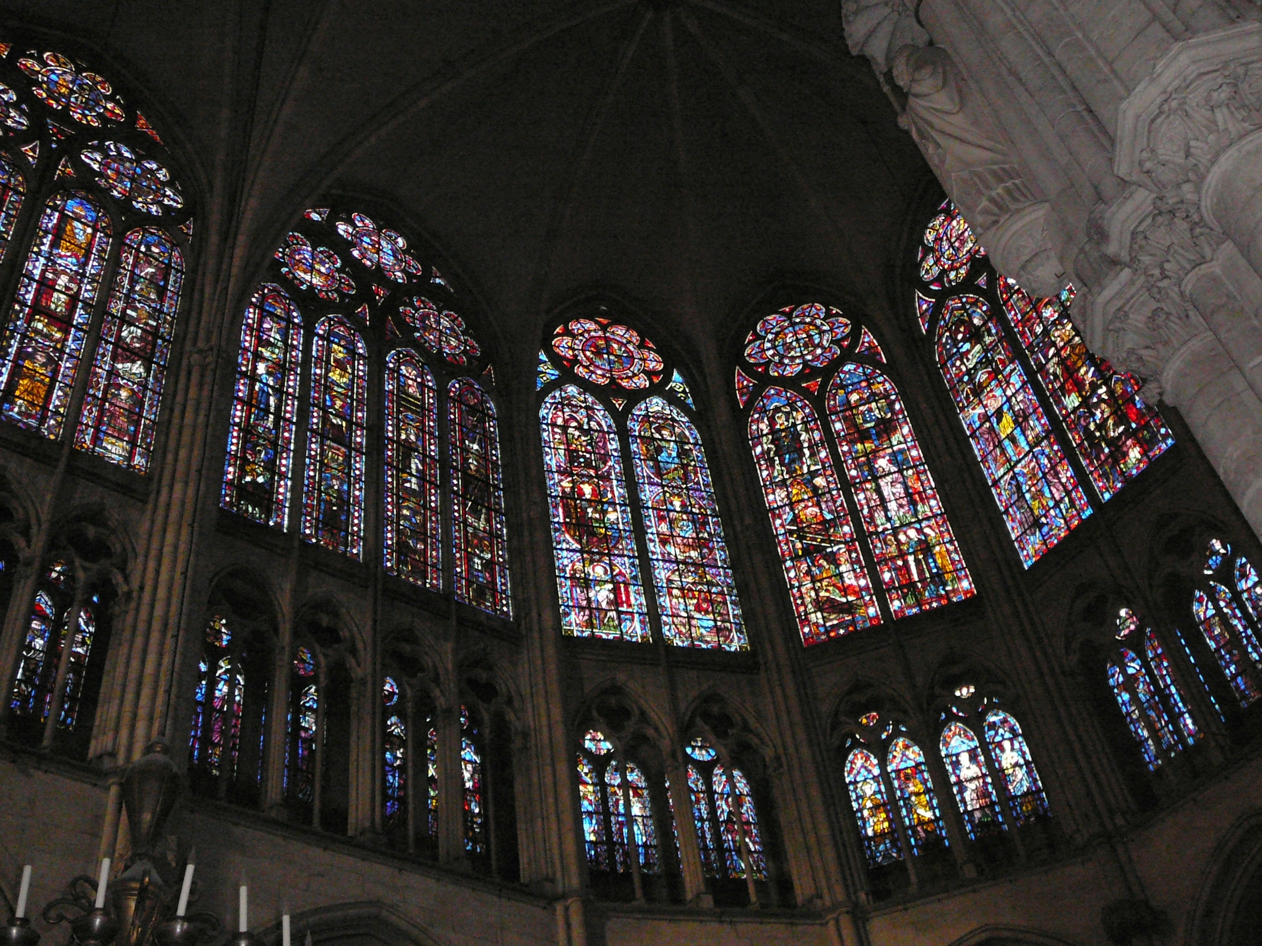 Vitraux du choeur de la cathédrale